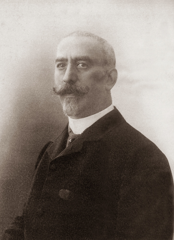 Theodor Pollak (1904-1906) Bielitz